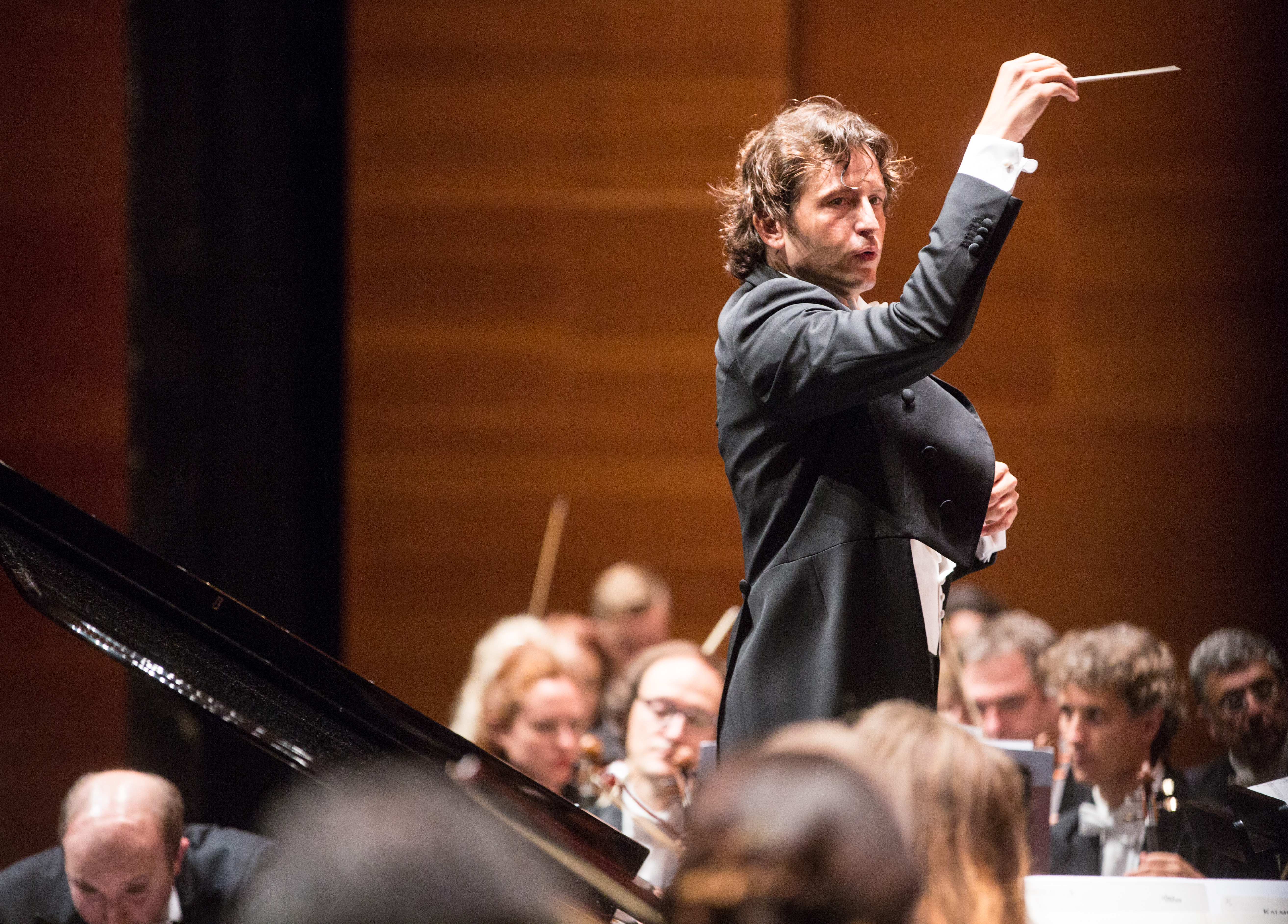 ©Quincena Musical-Iñigo Ibáñez